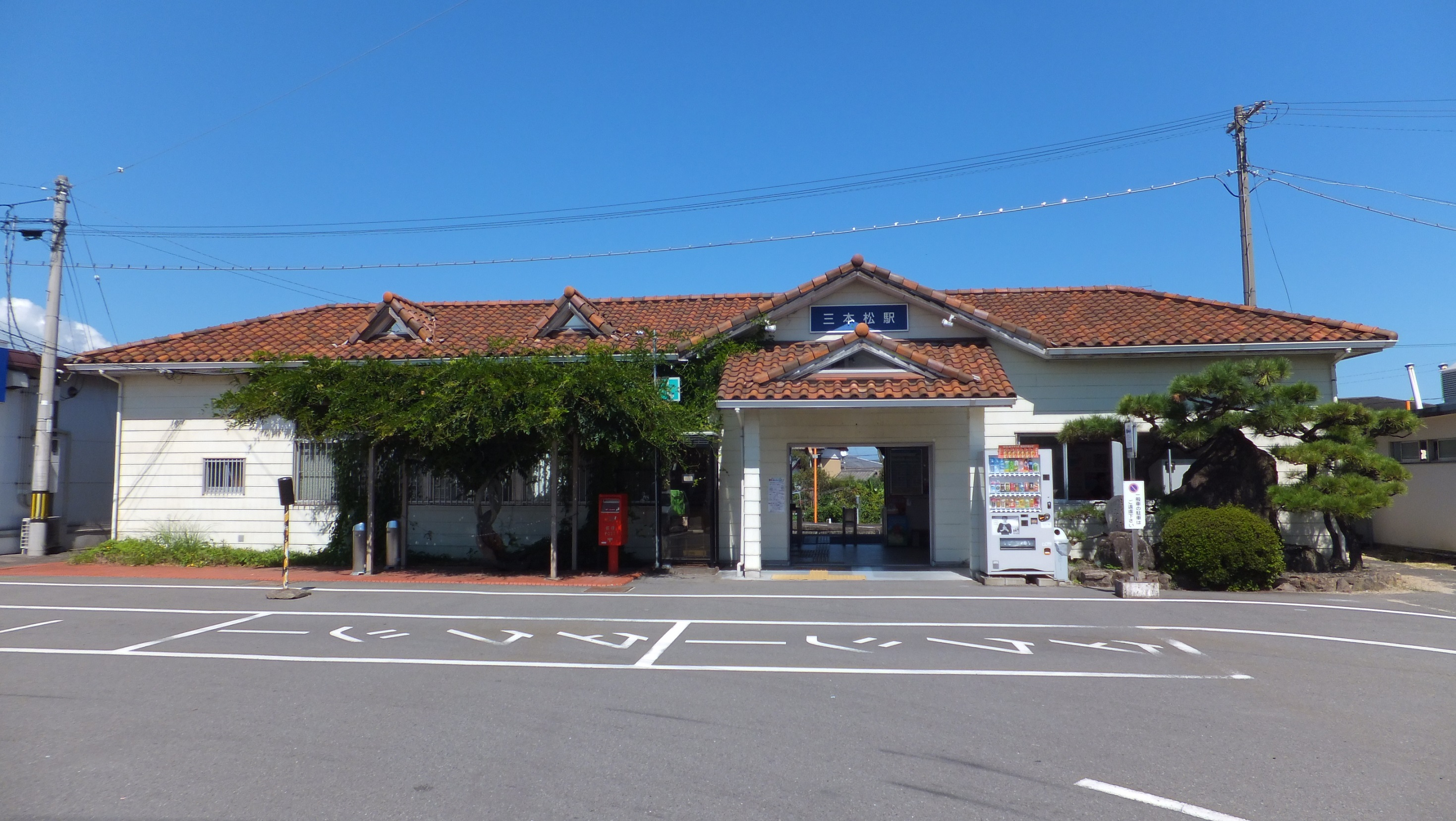 JR高徳線 三本松駅 （香川県東かがわ市 2015年）